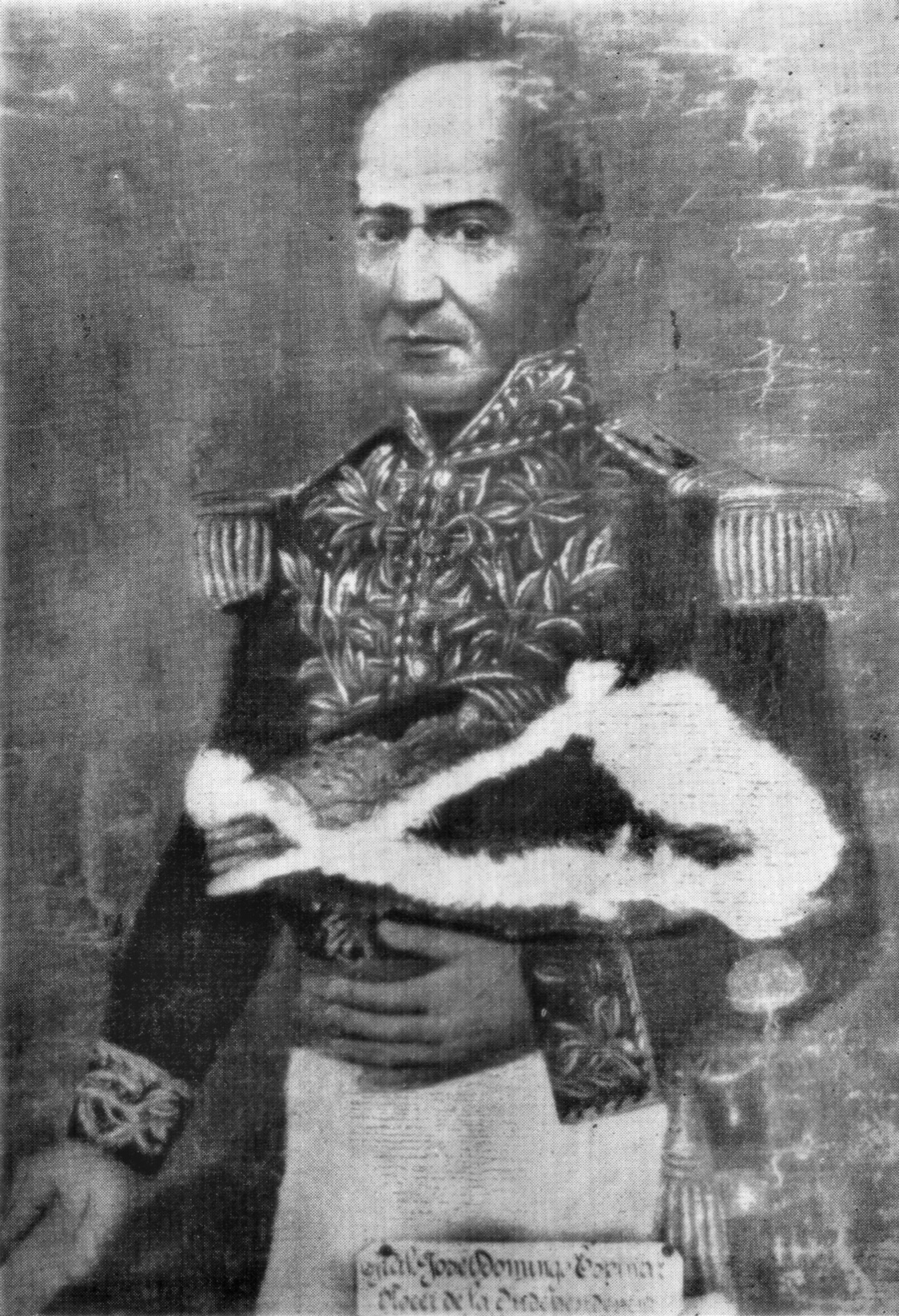 Reproducción de un óleo de José Domingo Espinar hecho en 1824.